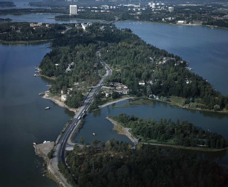 1975 . Munkkiniemi, Kuusisaari. Keskellä Kuusisaarensalmi ja Pikku Kuusisaari.